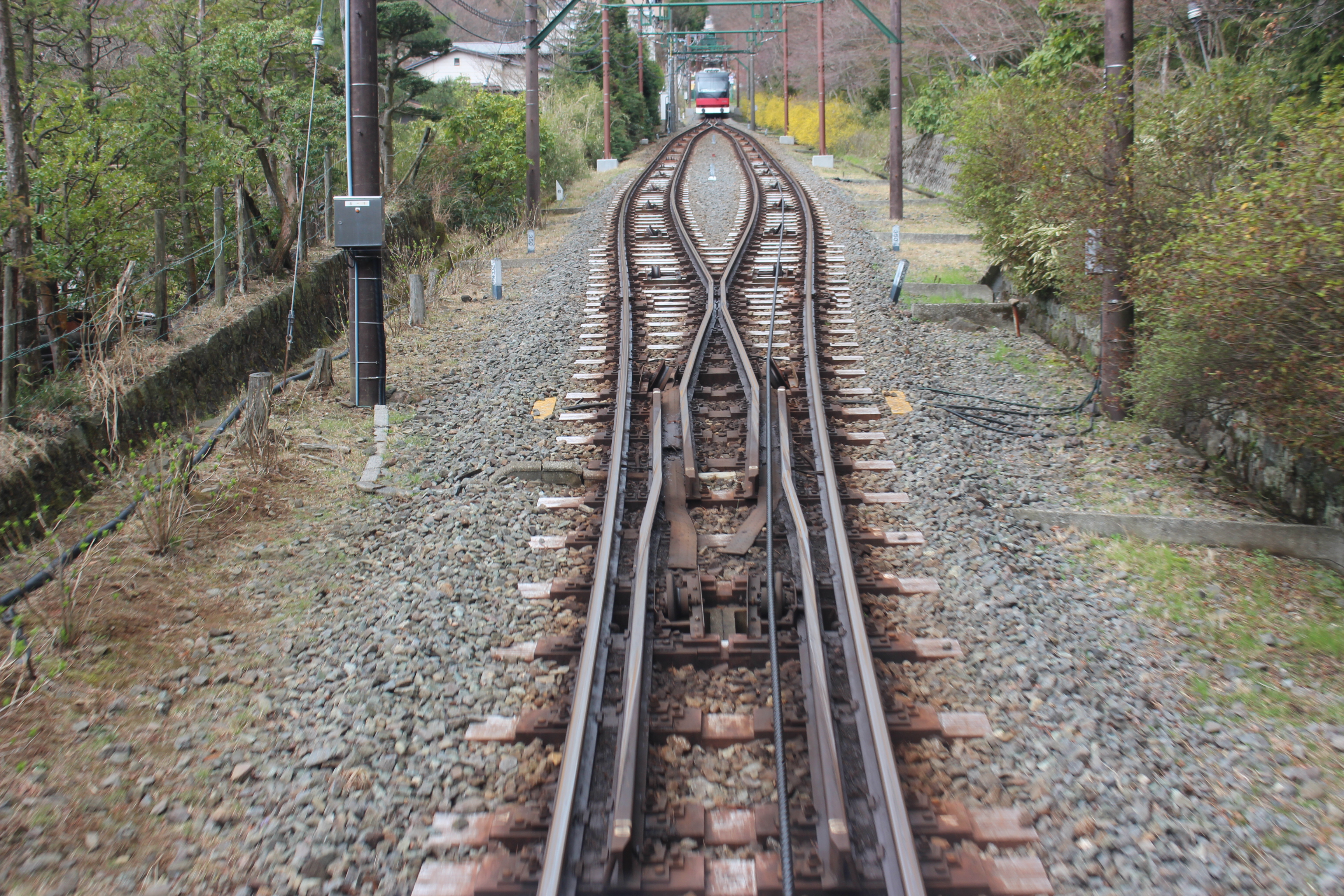 Exemple d'évitement central sans aiguille mobile, dit Abt.